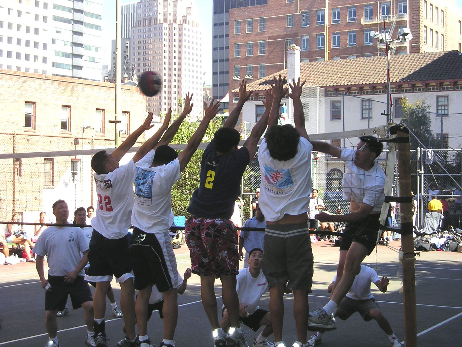 Nineman volleyball